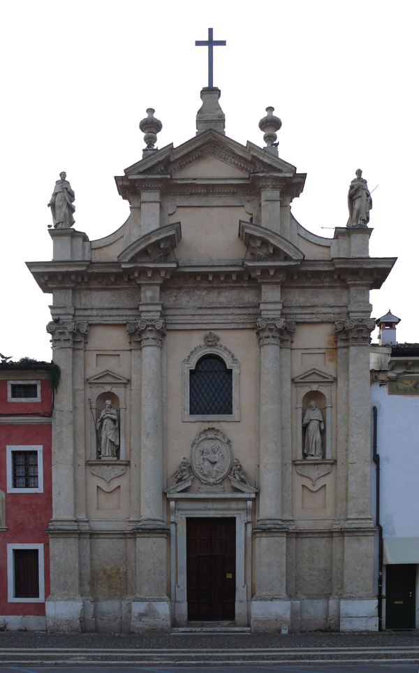 Chiesa della Disciplina -Villafranca di Verona